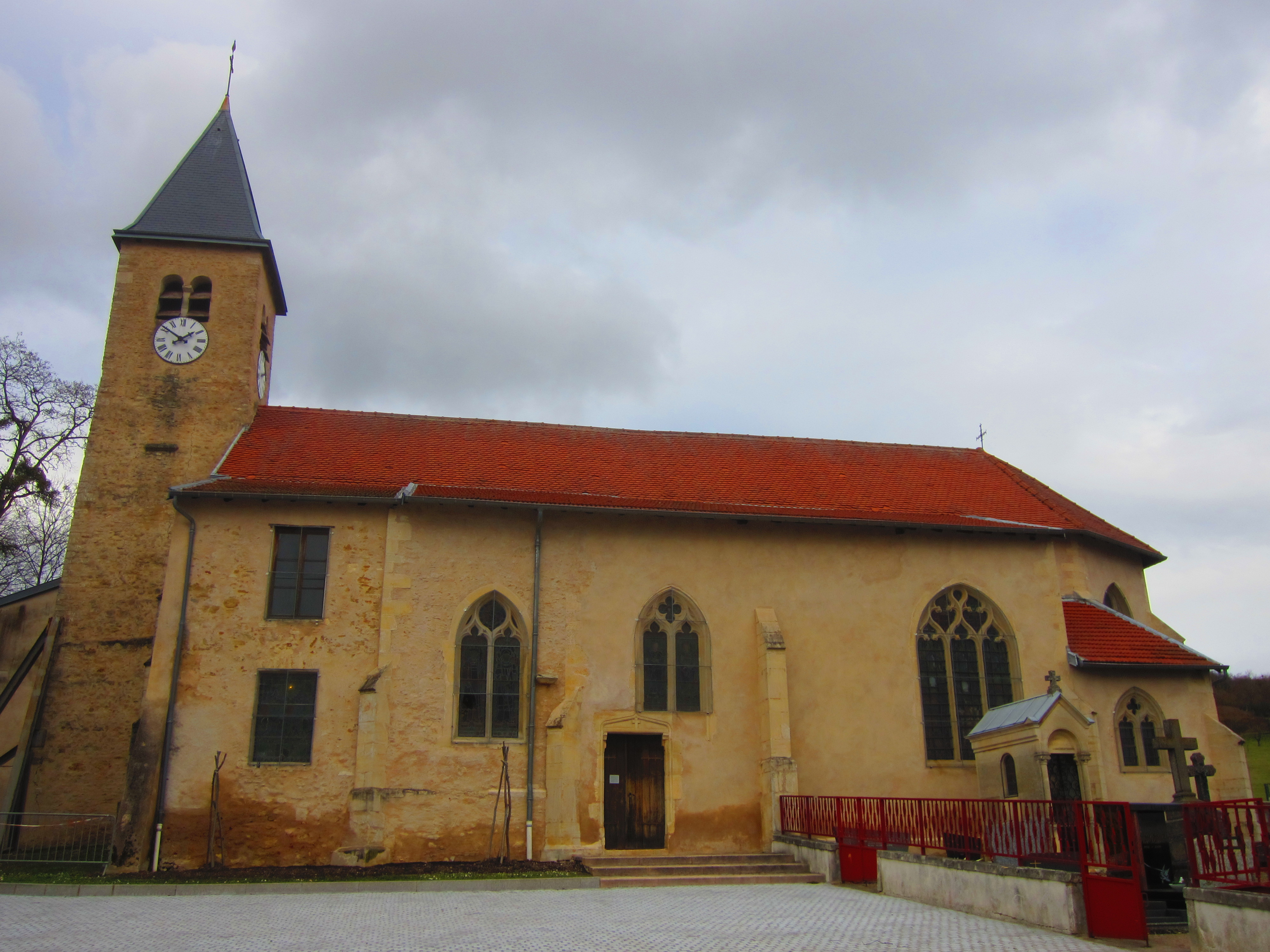 Essey Nancy eglise st georges